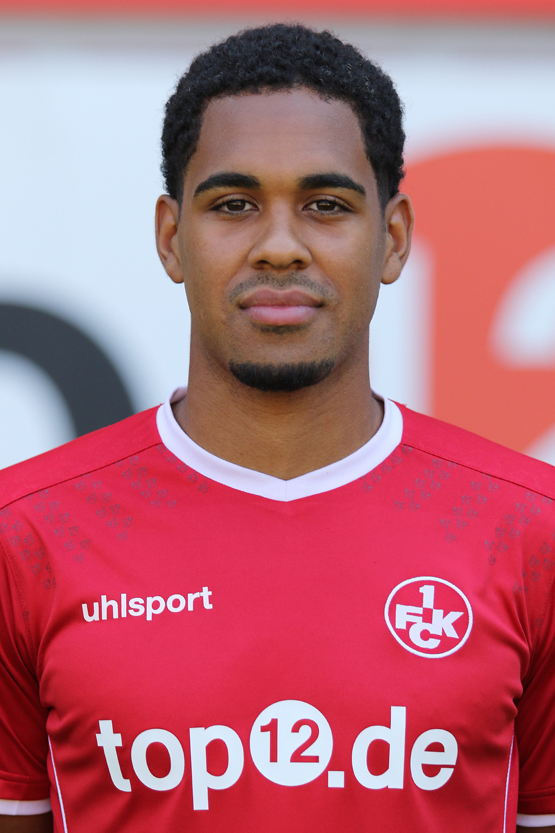 Phllipp Mwene